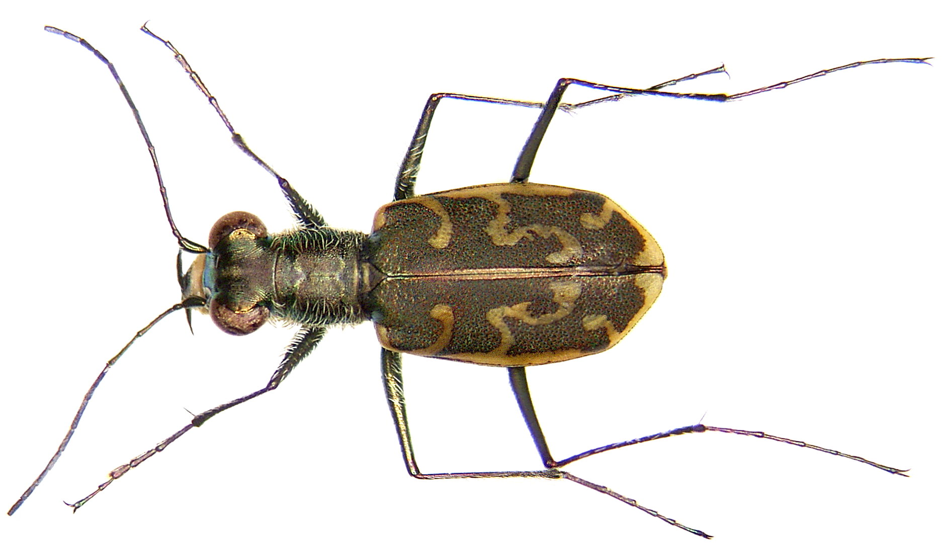 Familie: Carabidae Groesse: 10 mm Verbreitung: Südeuropa Fundort: Italien, Adria, Bibione leg.det. U.Schmidt, 1996 Photo: U.Schmidt, 2007